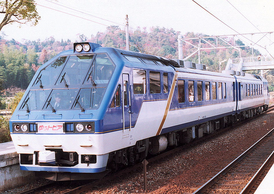 キロ65 ゆぅトピア